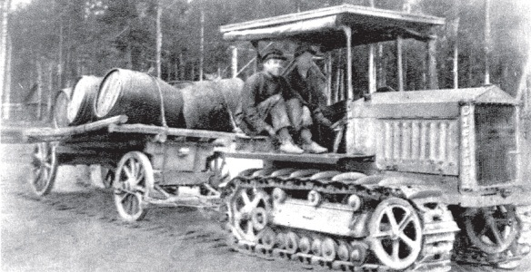 Перавока грузаў у саўгасе X-годдзе БССР. 1930-я